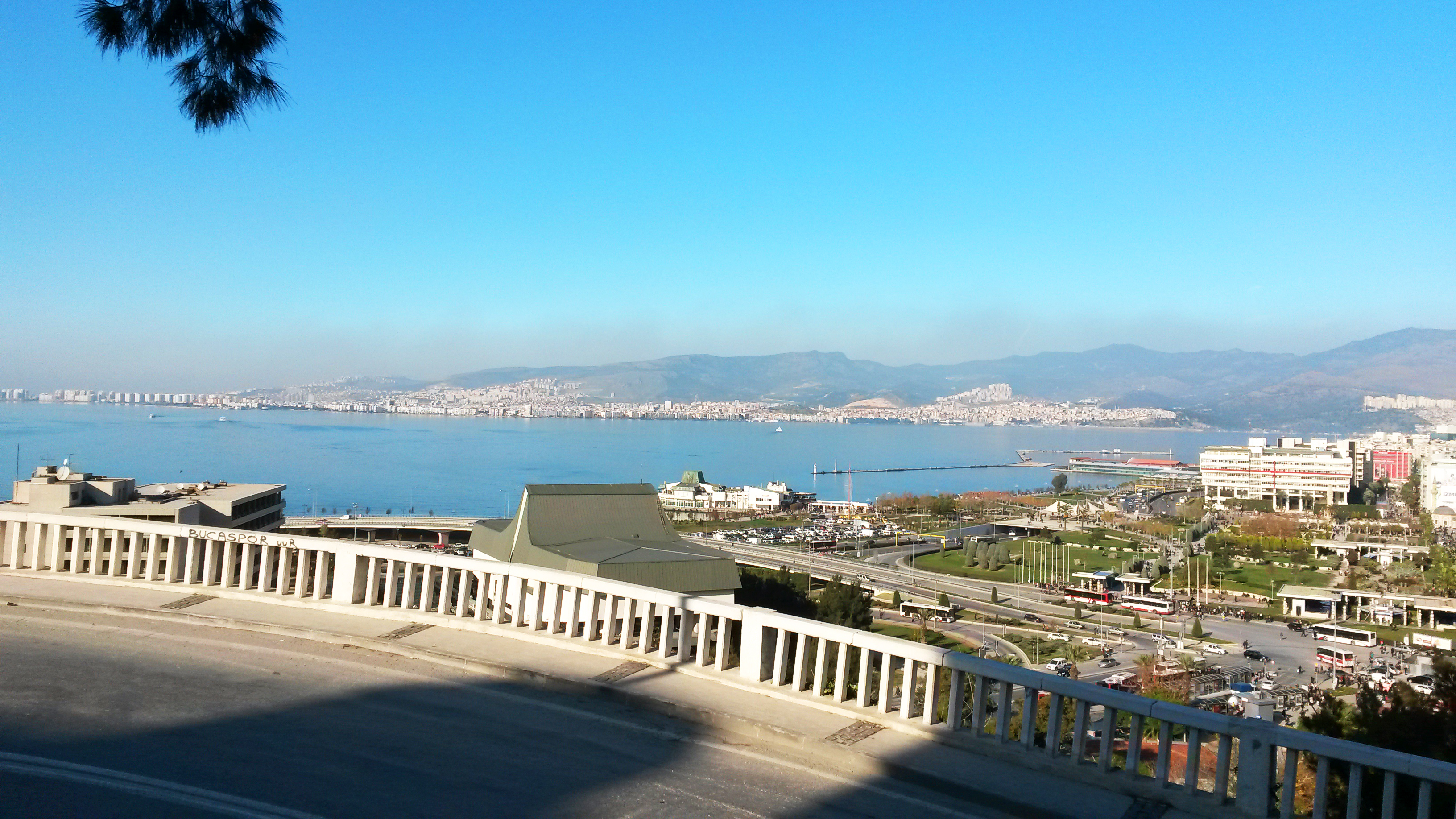 Varyant